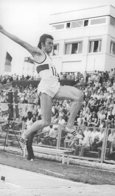 Frank Wartenberg ADN-ZB Mittelstädt 27.6.73 Berlin: Vorschaumotiv zum Leichtathletik-Länderkampf DDR-Großbritannien am 30.6.-1.7.73 in Leipzig. Sein Debüt in der DDR-Nationalmannschaft der Männer gibt der 19jährige Weitspringer Frank Wartenberg (SC Chemie Halle) . Beim diesjährigen Olympischen Tag in Berlin konnte er mit 7,94 m (Foto) eine persönliche Bestleistung aufstellen.